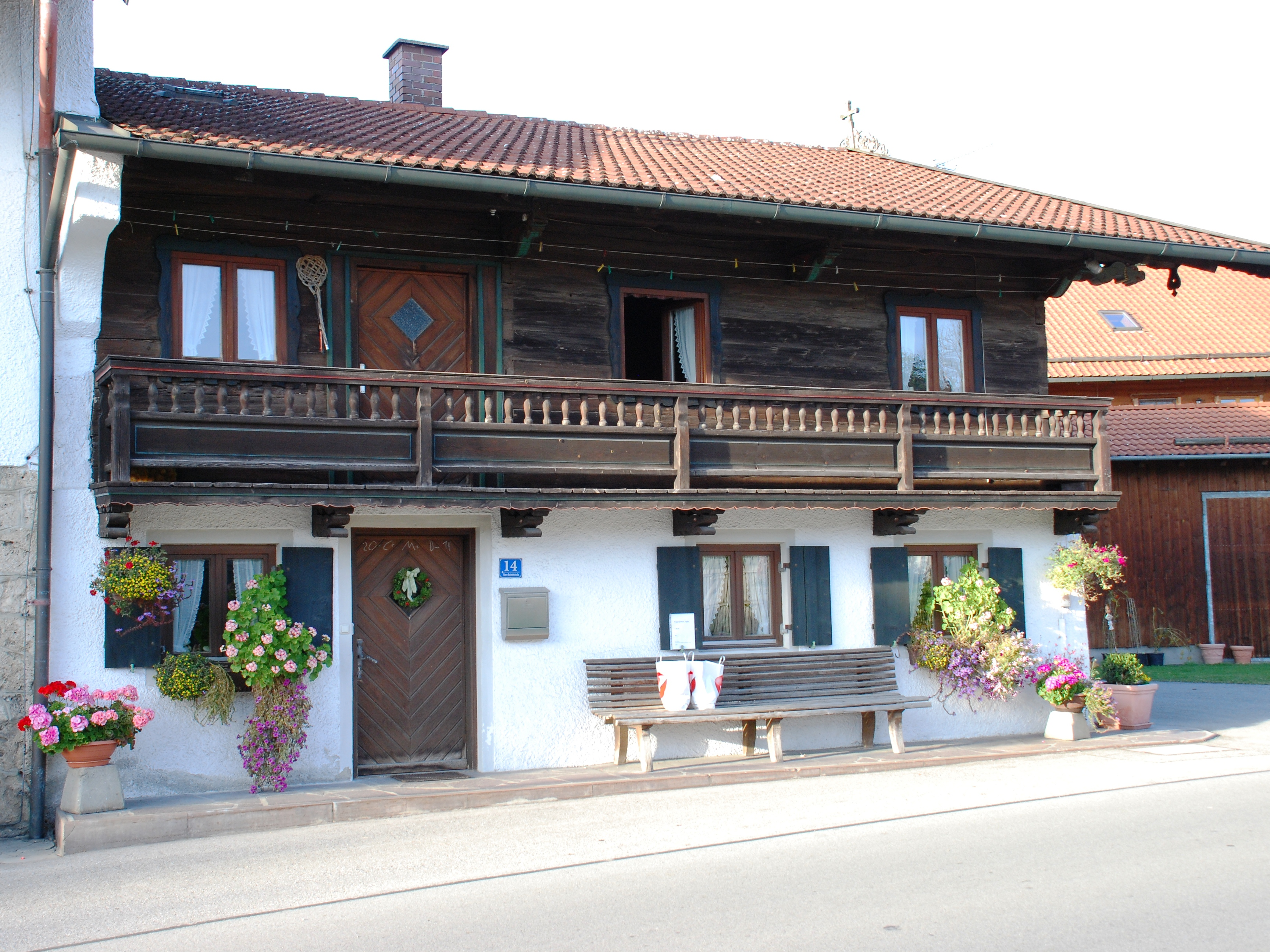 Bauernhof "Beim Gödl" in Großhelfendorf, Ortsteil von Aying, Landkreis München, Regierungsbezirk Oberbayern, Bayern. Als Baudenkmal unter Aktennummer D-1-84-137-33 in der Bayerischen Denkmalliste aufgeführt. Bild gemäß den Vorgaben zur Panoramafreiheit von öffentlichem Verkehrsgrund aus aufgenommen.